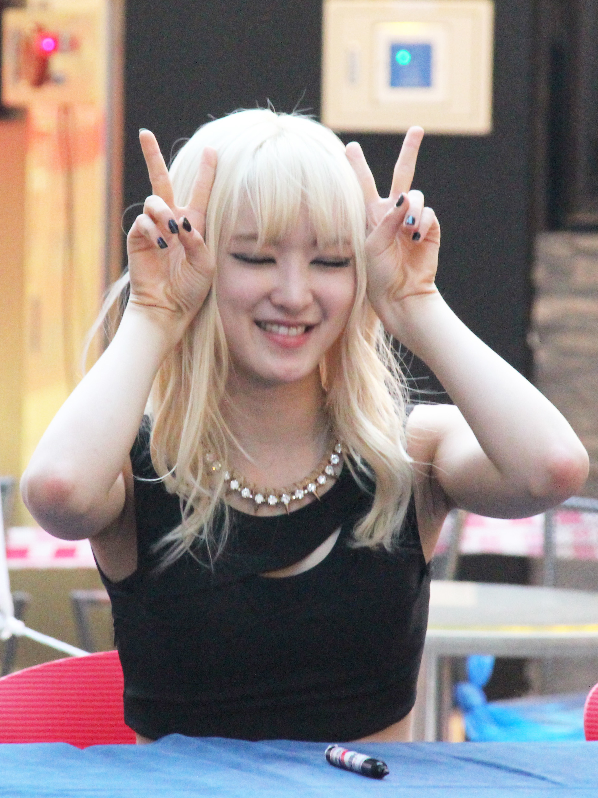 130629 애프터스쿨 메세나폴리스 '첫사랑' 팬싸인회